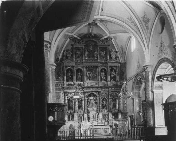 Interior de l'església de l'Assumpció de Xerta cap al 1920, amb el retaule barroc desaparegut. Fotografia de Josep Salvany, ca. 1920, avui a la Biblioteca de Catalunya